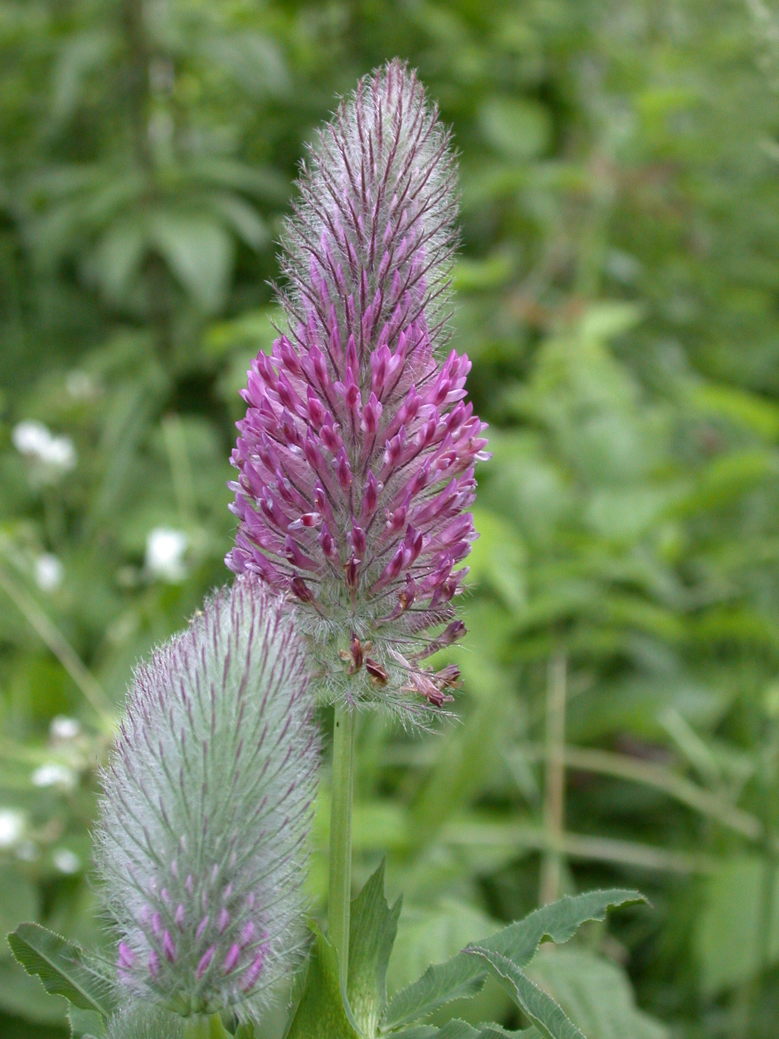 Trifolium rubens Caténa de Rangeval (Meuse), France